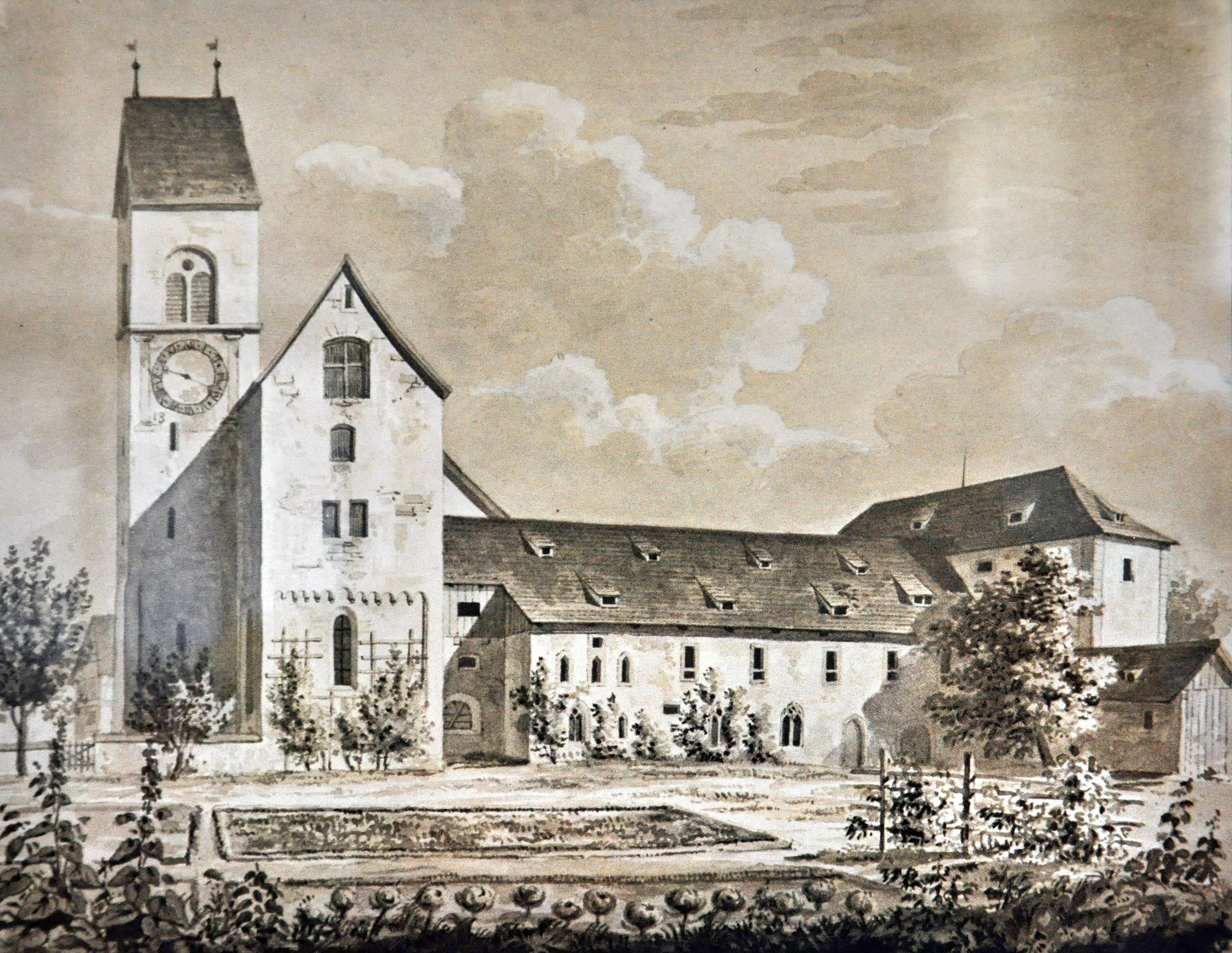 Kloster Rüti, Gemälde nach der Zeichnung von Ludwig Schulthess, um 1840